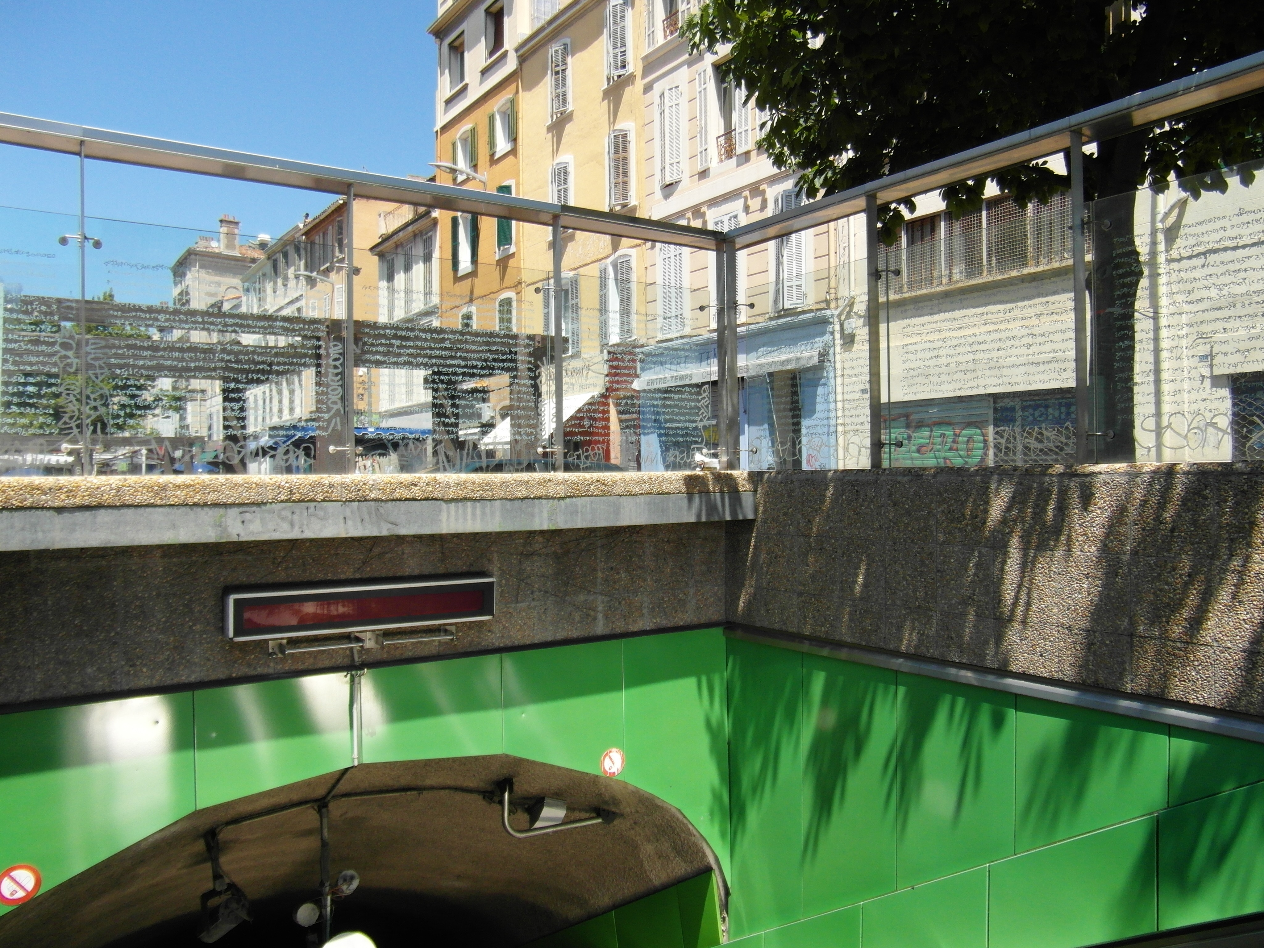 Marseille - Métro - Notre Dame du Mont